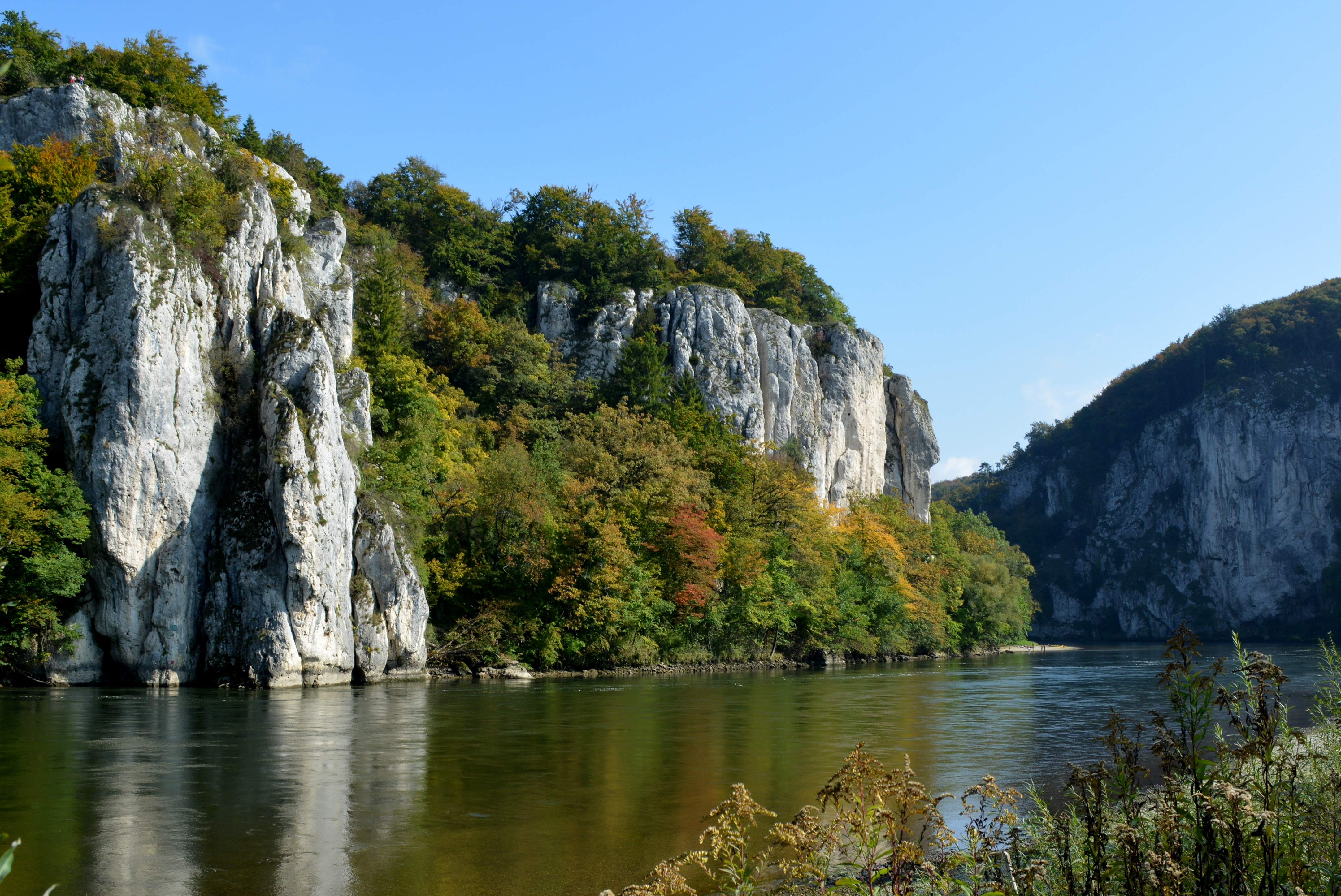 Das ursprüngliche Tal der Donau (Ur-Donau oberhalb Kelheim) war fünf Millionen Jahre lang das heutige Altmühltal, das mit dem heutigen Donauverlauf über das Wellheimer Trockental verbunden ist. Bei Kelheim mündete damals ein aus Richtung Ingolstadt kommender Nebenfluss ("Ingolstädter Albsaumfluss"). Dieser hatte sich durch ständige Eintiefung des Flusses in Richtung Quelle ("rückschreitende Erosion") langsam durch den harten Riegel der Malmkalke gegraben, und so die Schlucht der Weltenburger Enge geschaffen. Bereits 1840 erhob sie König Ludwig I. zum ersten Naturschutzgebiet Bayerns. Quelle: Bayerisches Landesamt für Umwelt